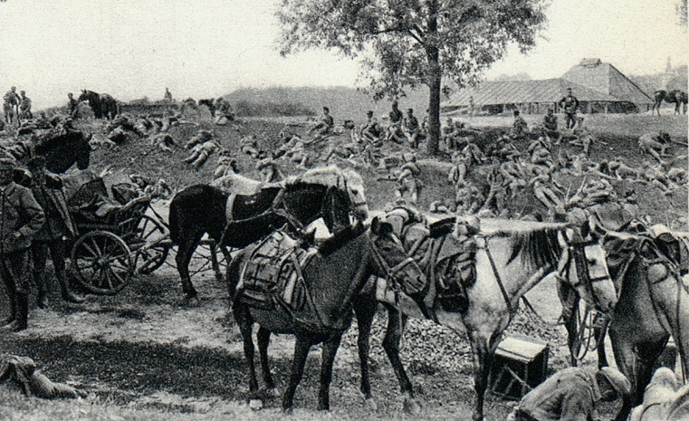 Odpoczynek oddziałów legionowych pod Jastkowem